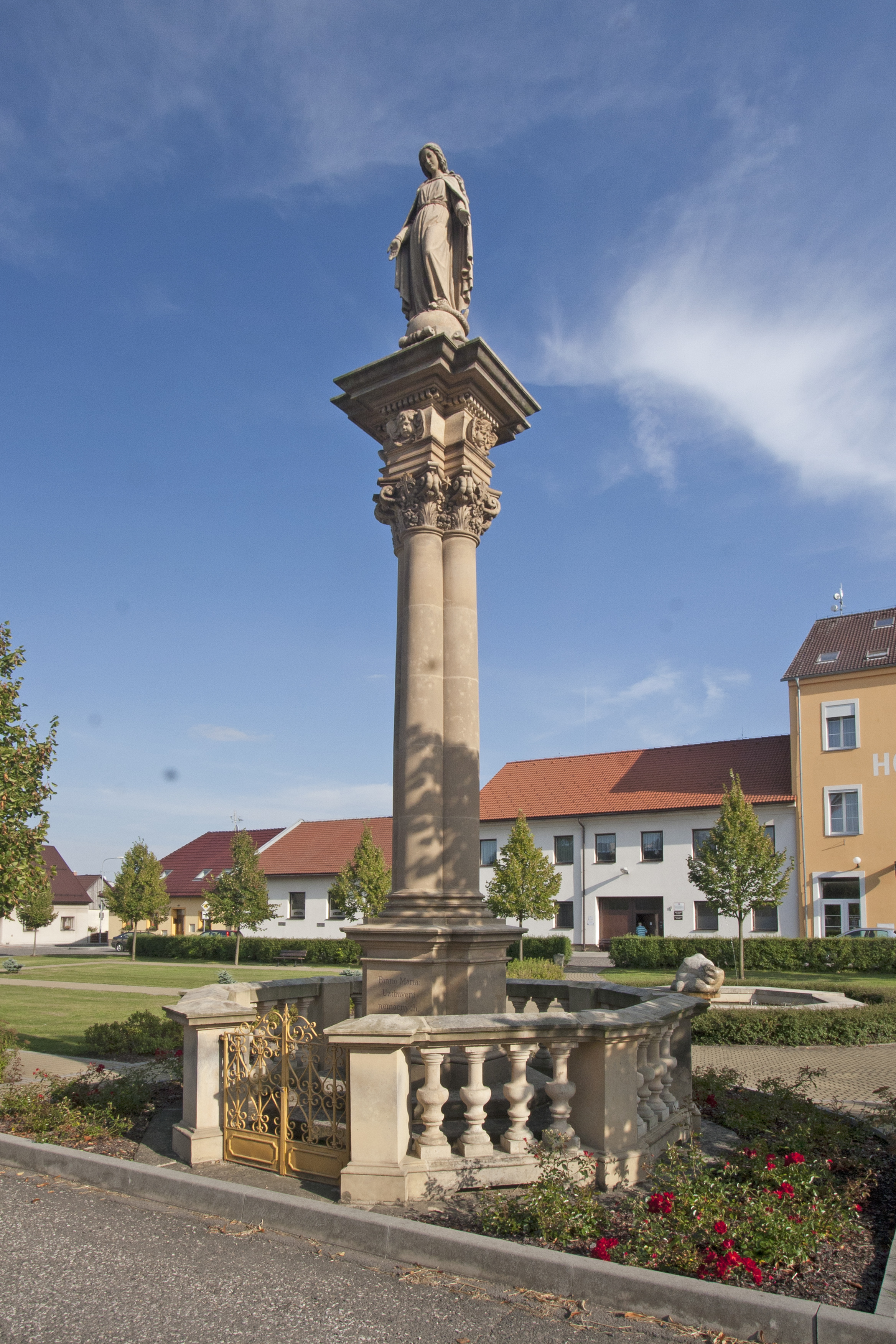 Sloup se sochou Panny Marie (Mlázovice), Náměstí, Mlázovice